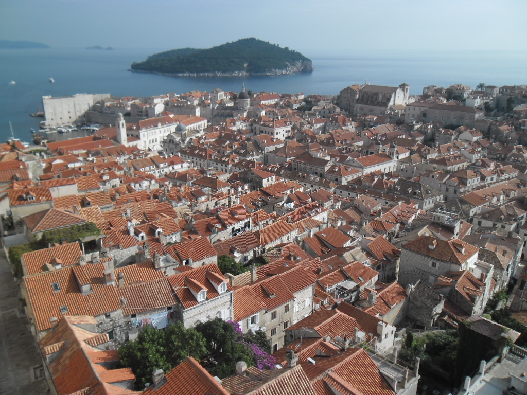 Dubrovnik